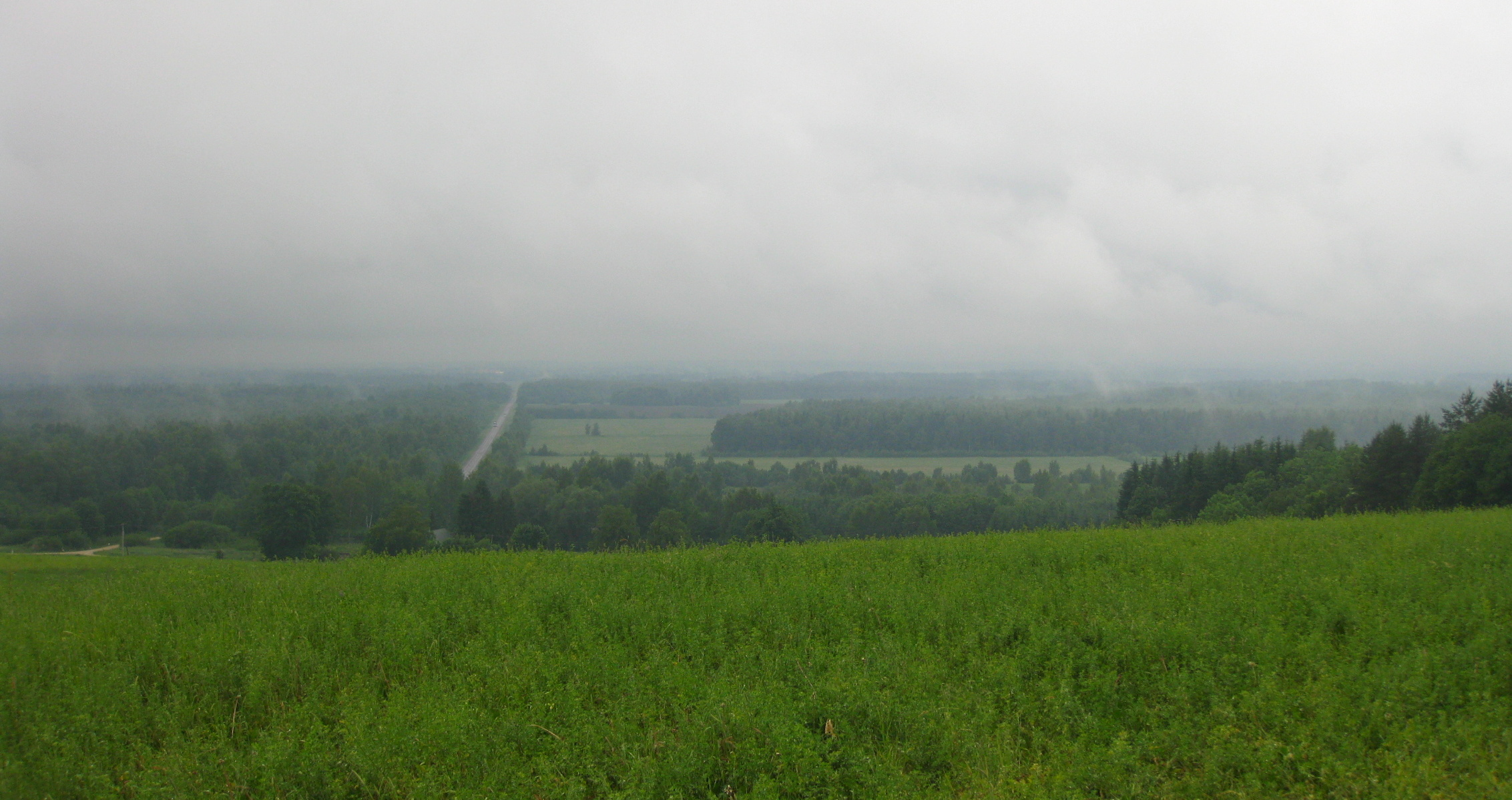 Vaade Laiuse mäelt läände